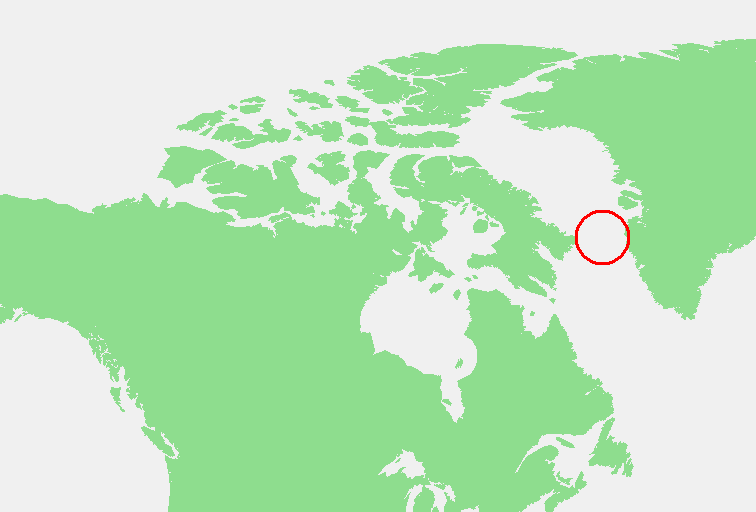 Davis Strait.PNG